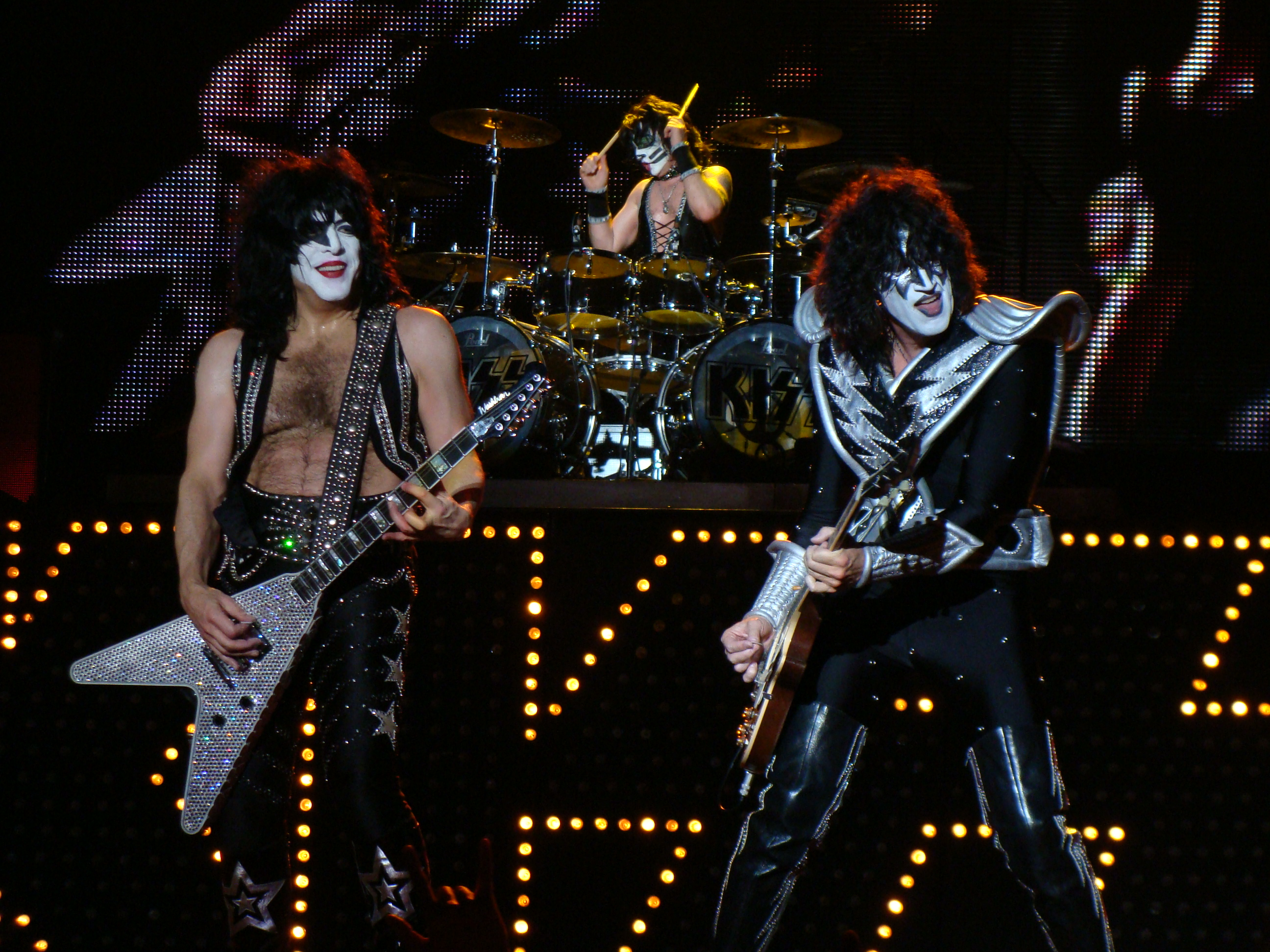 Actuación del grupo KISS en Vitoria-Gasteiz, en el Azkena Rock Festival.